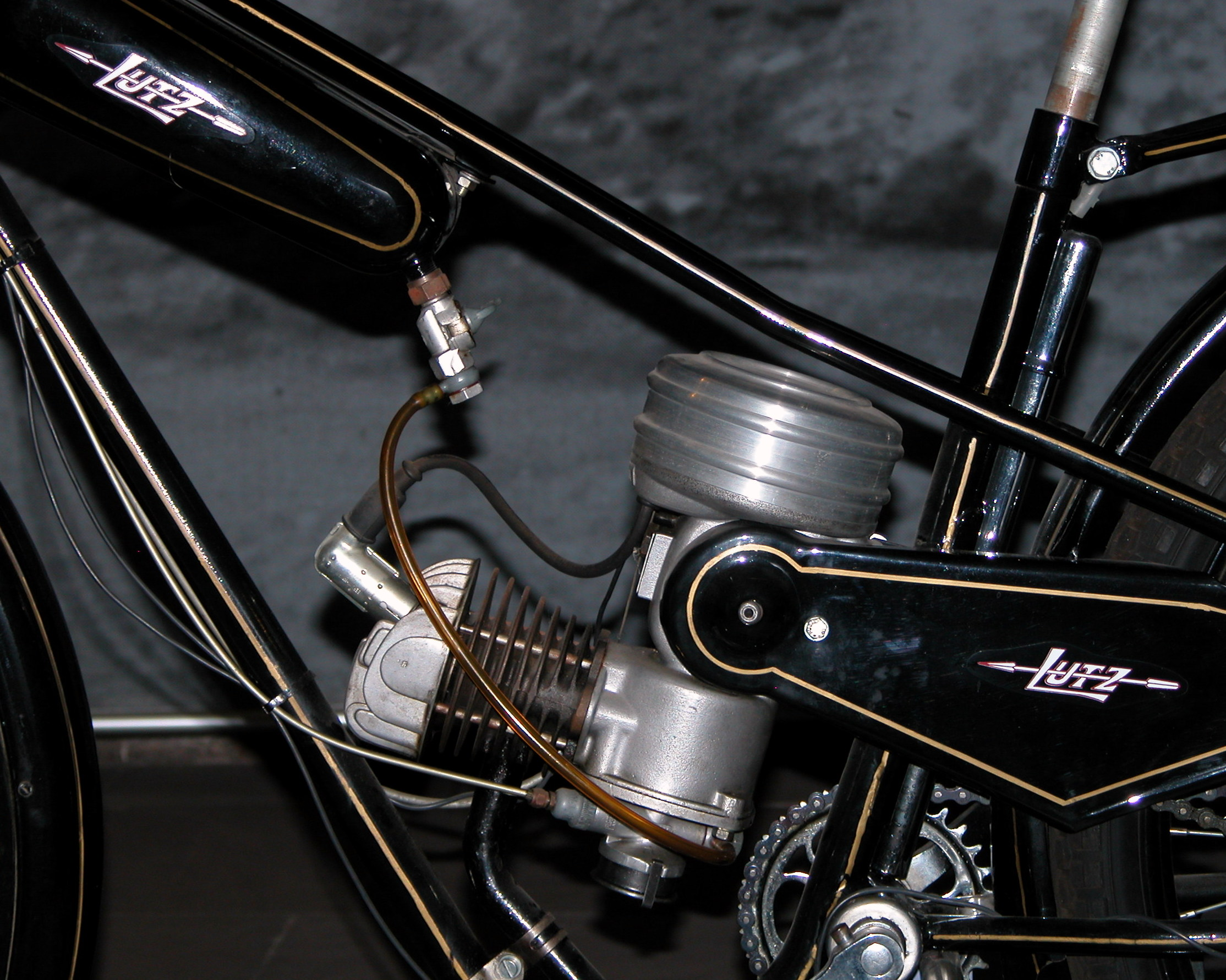 Braunschweig, Städtisches Museum, Altstadtrathaus: Detailaufnahme von Motor, Tank und Logo eines LUTZ P 53, privates Moped von Otto Lutz.